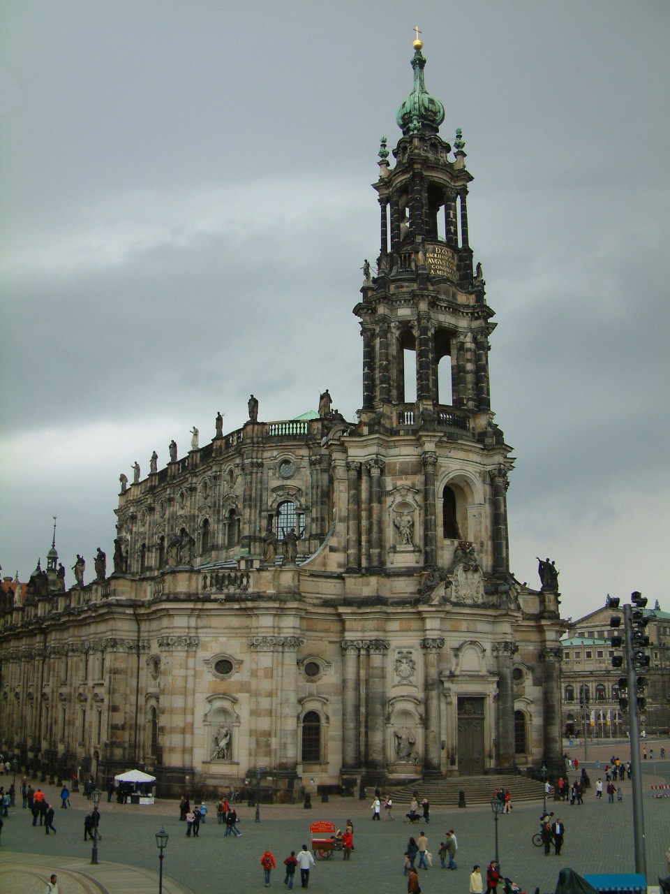 Hofkirche, Dresden, Sachsen, Deutschland.